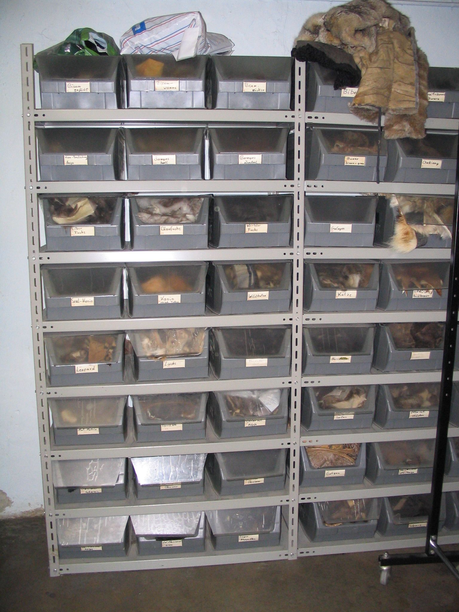 Teilansicht der Pelzreste für Pelzreparaturen und -änderungen in einer Kürschnerei. Gesehen bei Firma CHR. SCHAD PELZ UND LEDER, Ludwigshafen